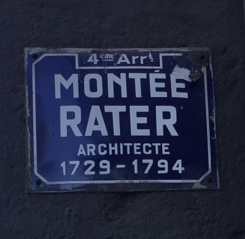 Montée Rater Lyon.